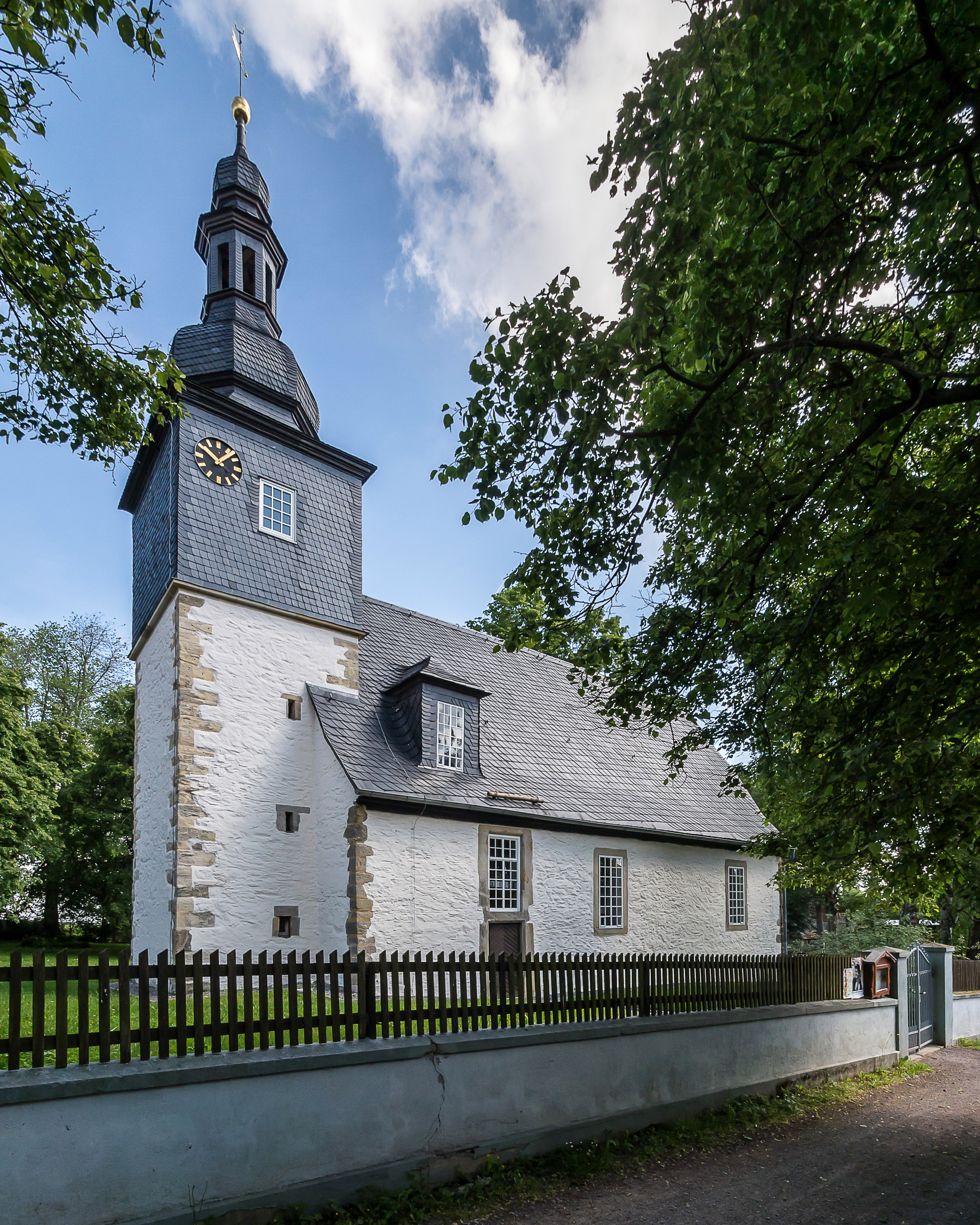 Egelsdorf Kirche mit Ausstattung